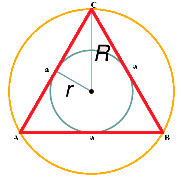 Triangal eq